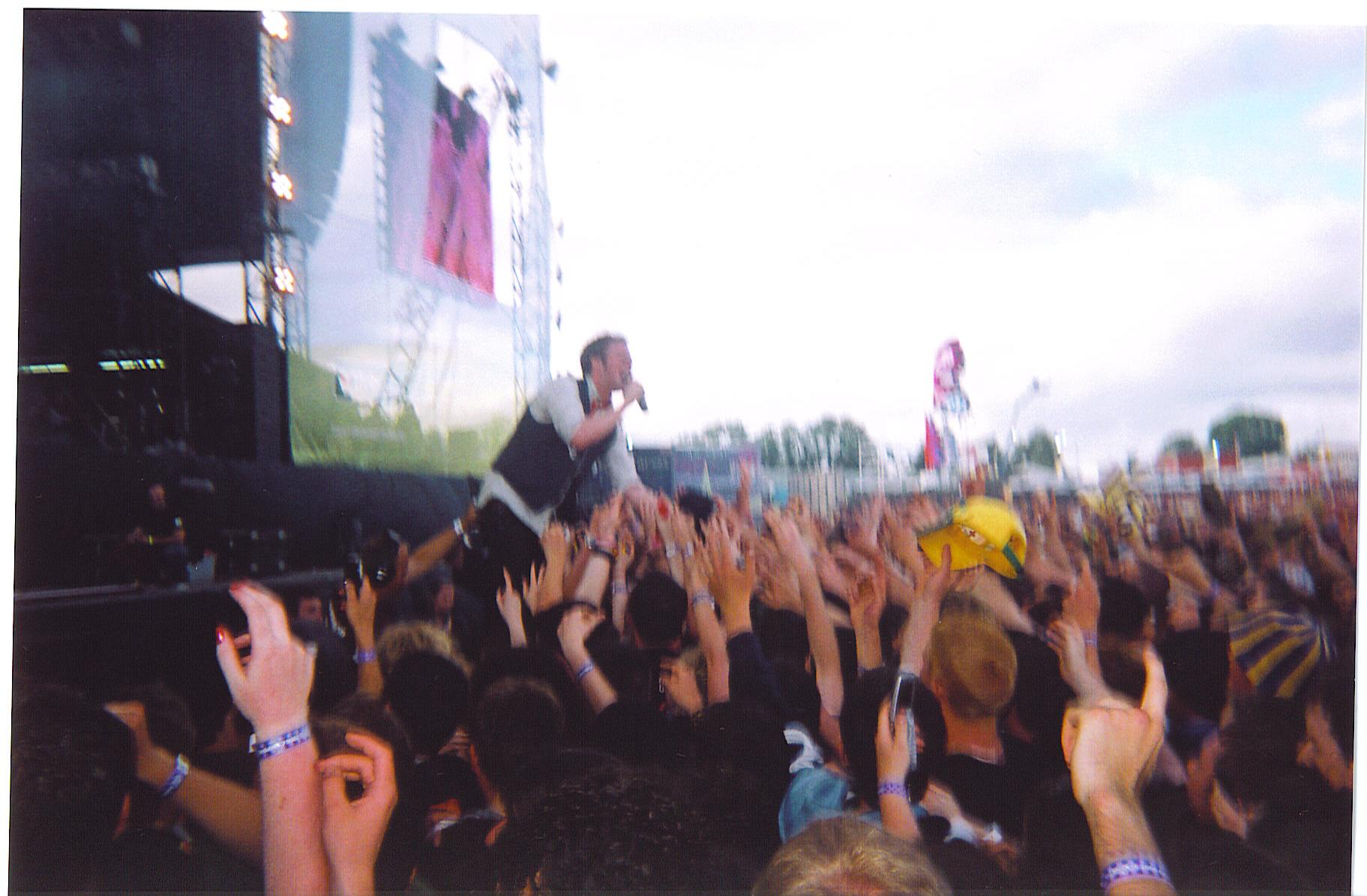 my pic